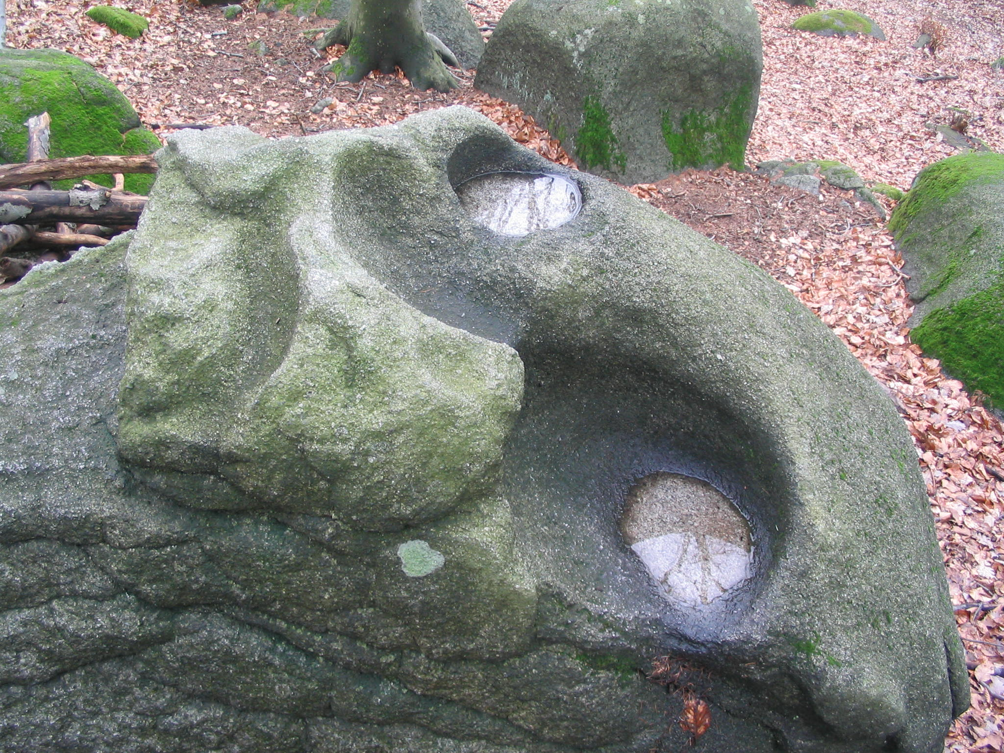 Schalenförmige Verwitterung im Granodiorit. Mörlenbach-Juhöhe, Weg zum Kreiswald